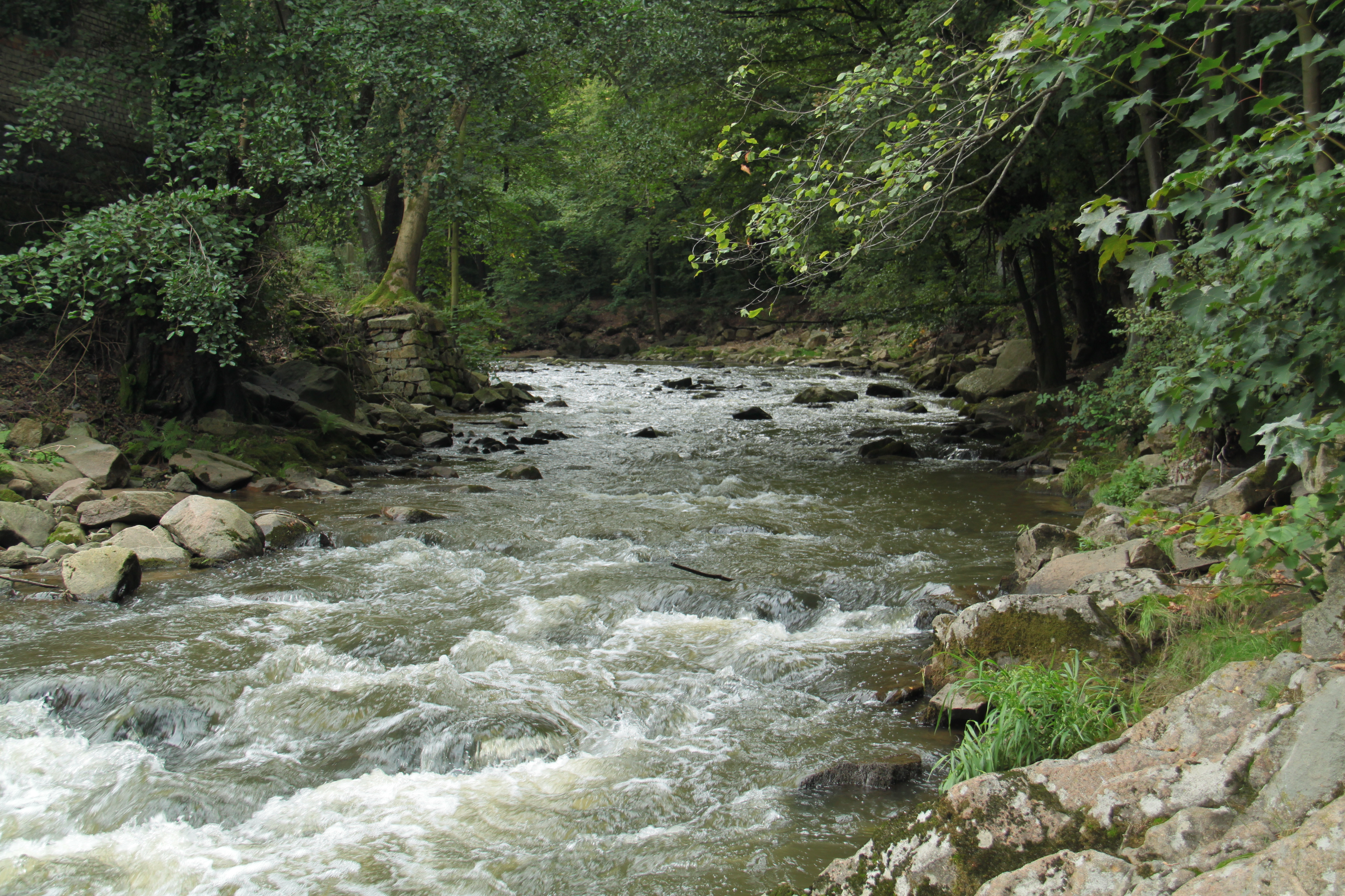 Impressionen Doberschau, Landkreis Bautzen, Sachsen